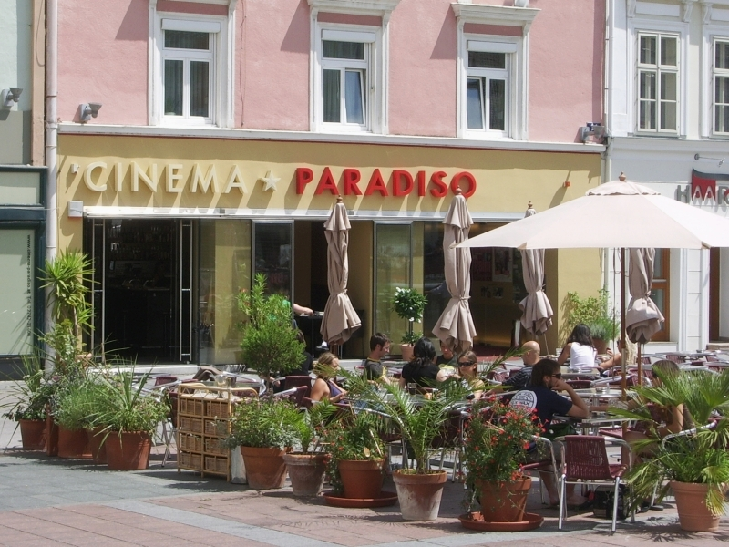 Cinema*Paradiso, St. Pölten, Lower Austria, Austria